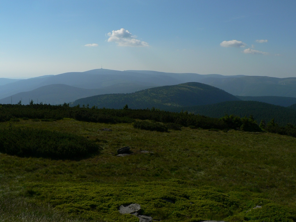 Pohled na Červenou horu z Keprníku, v pozadí hřeben pradědské části s Pradědem.